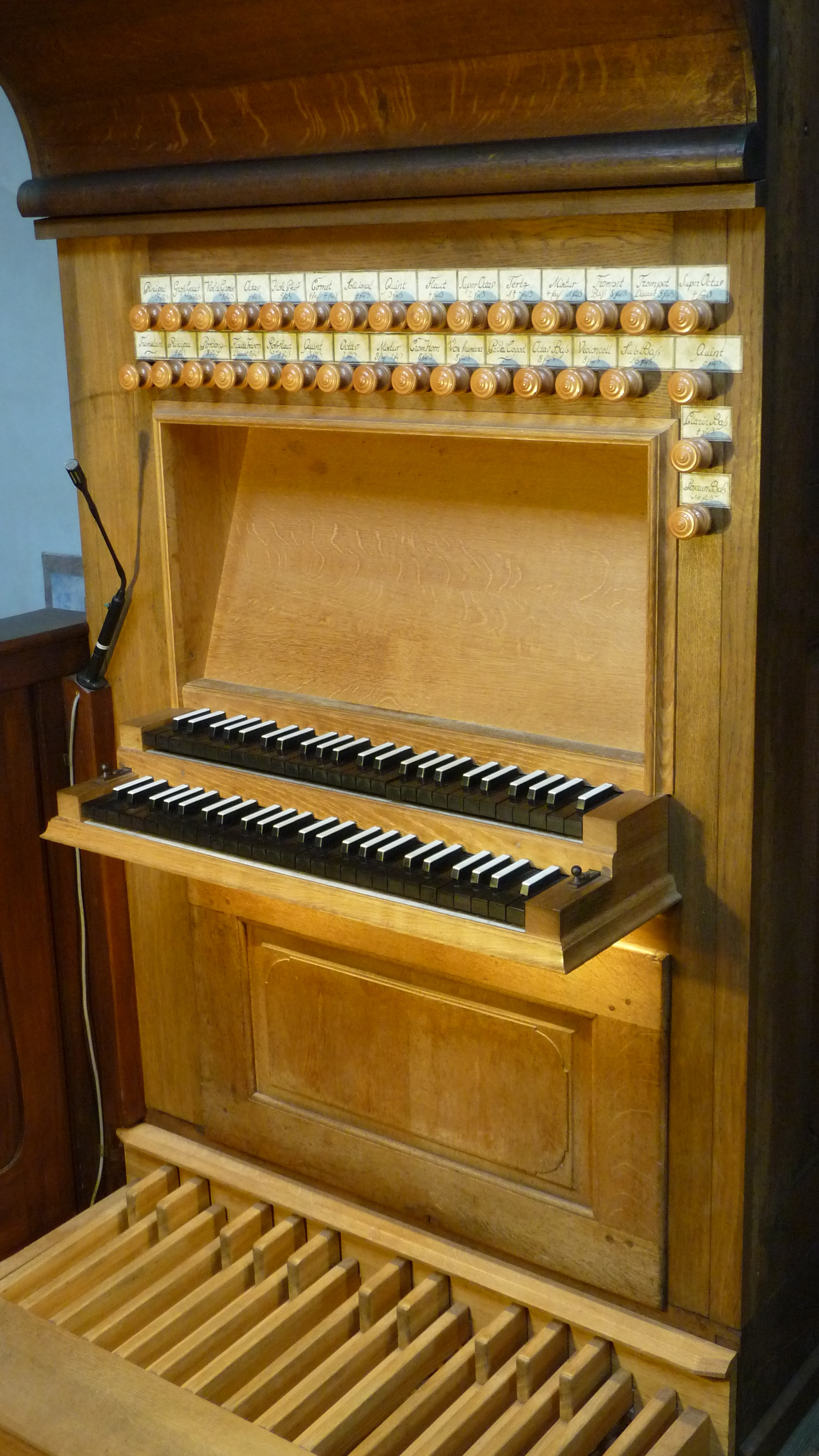 Abtei Sayn, Spielanlage der Stummorgel